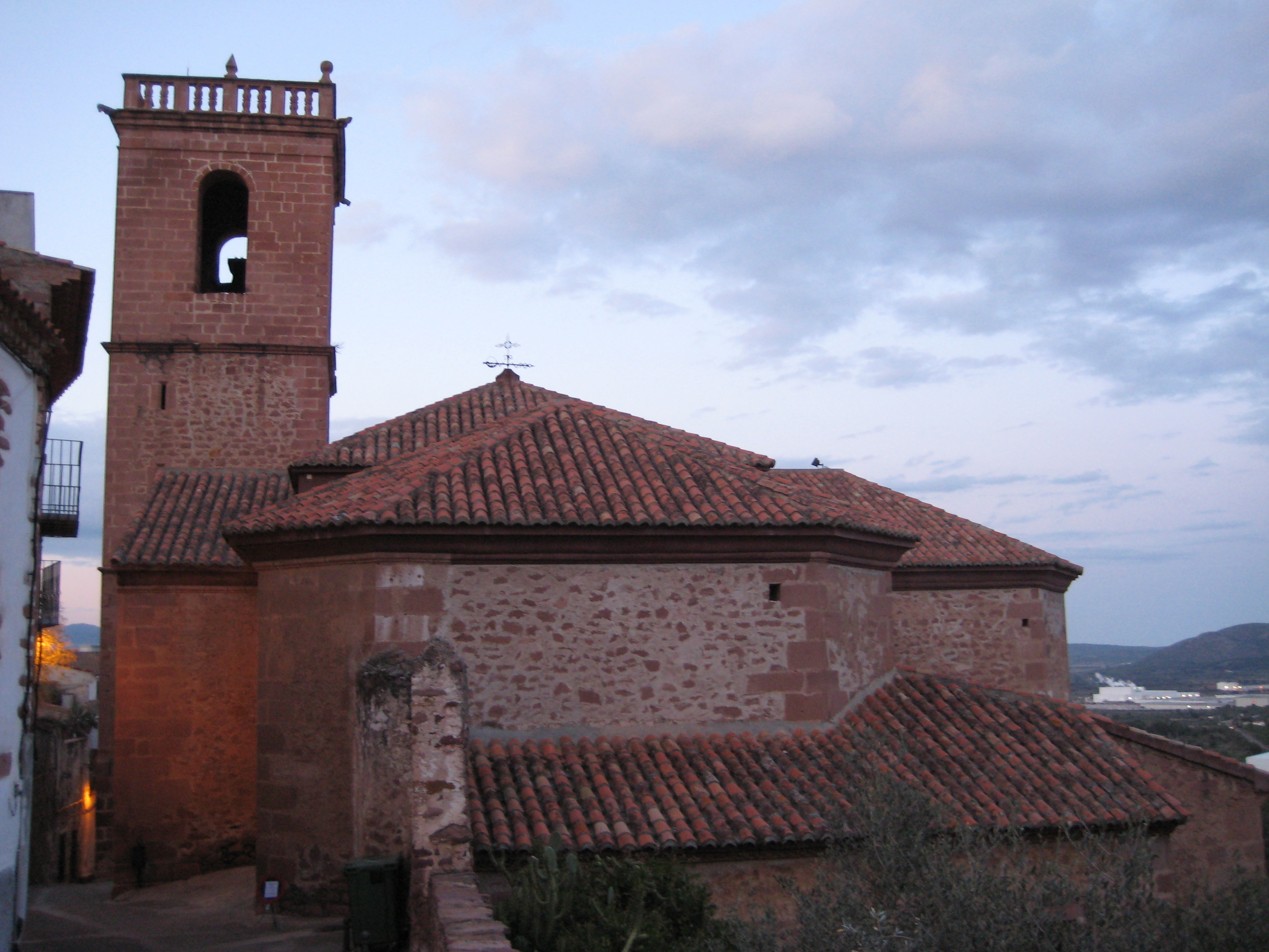 Església de l'Assumpció de Vilafamés (Plana Alta)